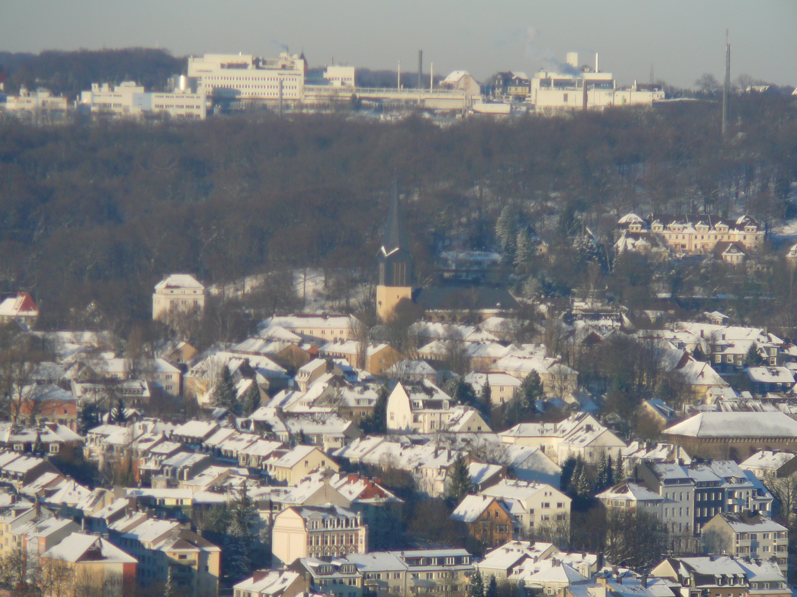 Obere Lichtenplatzer Straße, Wuppertal